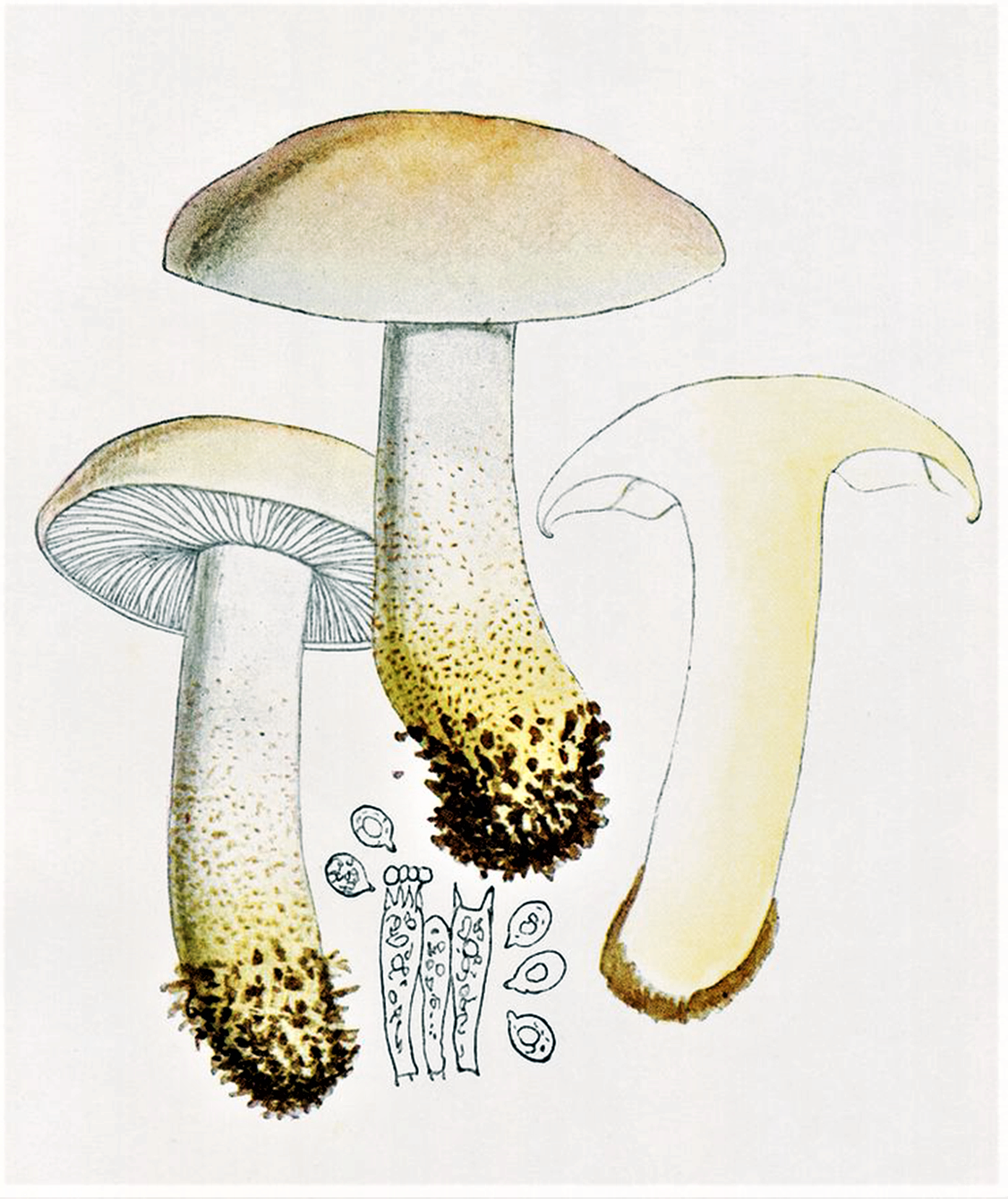 Giacomo Bresadola: Tricholoma sulphurescens Bres. (1905) Bres.: Tricholoma sulphurescens Bres. 1905, heute Tricholoma bufonium (Pers., 1801) Gillet (1874)